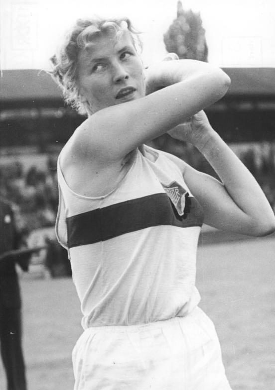 Stechemesser Zentralbild Wlocka 24.7.1956 VII. DDR-Leichtathletik-Meisterschaften in Erfurt In der Zeit vom 20. bis zum 22. Juli 1956 wurden im Erfurter Georg-Dimitroff-Stadion die VII. Leichtathletik-Meisterschaften der DDR ausgetragen. UBz: Siegerin im Diskuswerfen der Damen wurde Stechemesser (Motor Jena) .